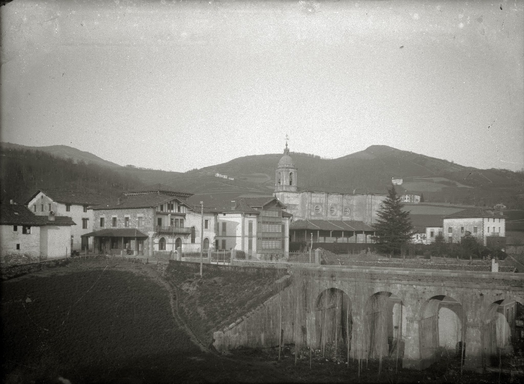 Título original: Vista general de Bidania en la localidad de Bidegoian (1/1) Localización: Bidegoyan (Guipúzcoa)